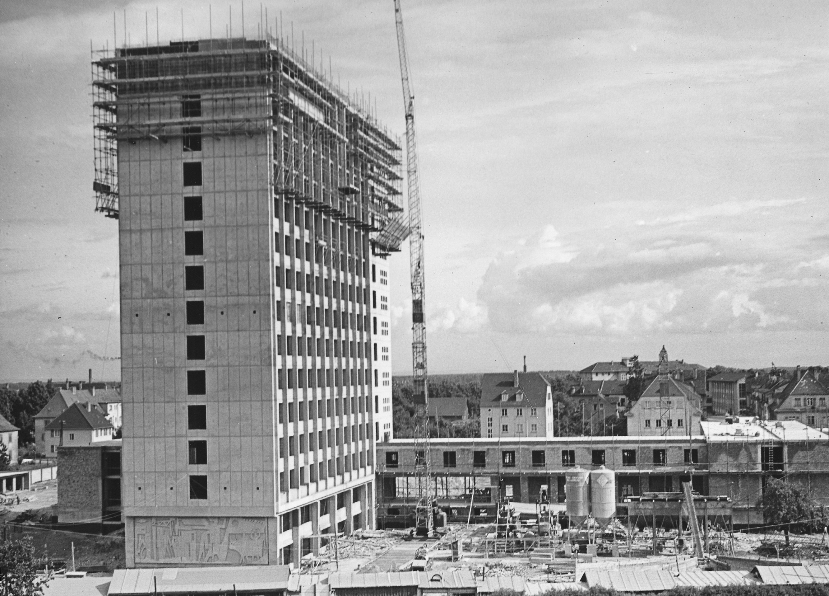 DRV-Hochhaus. Aufnahme aus der Bauphase um 1958